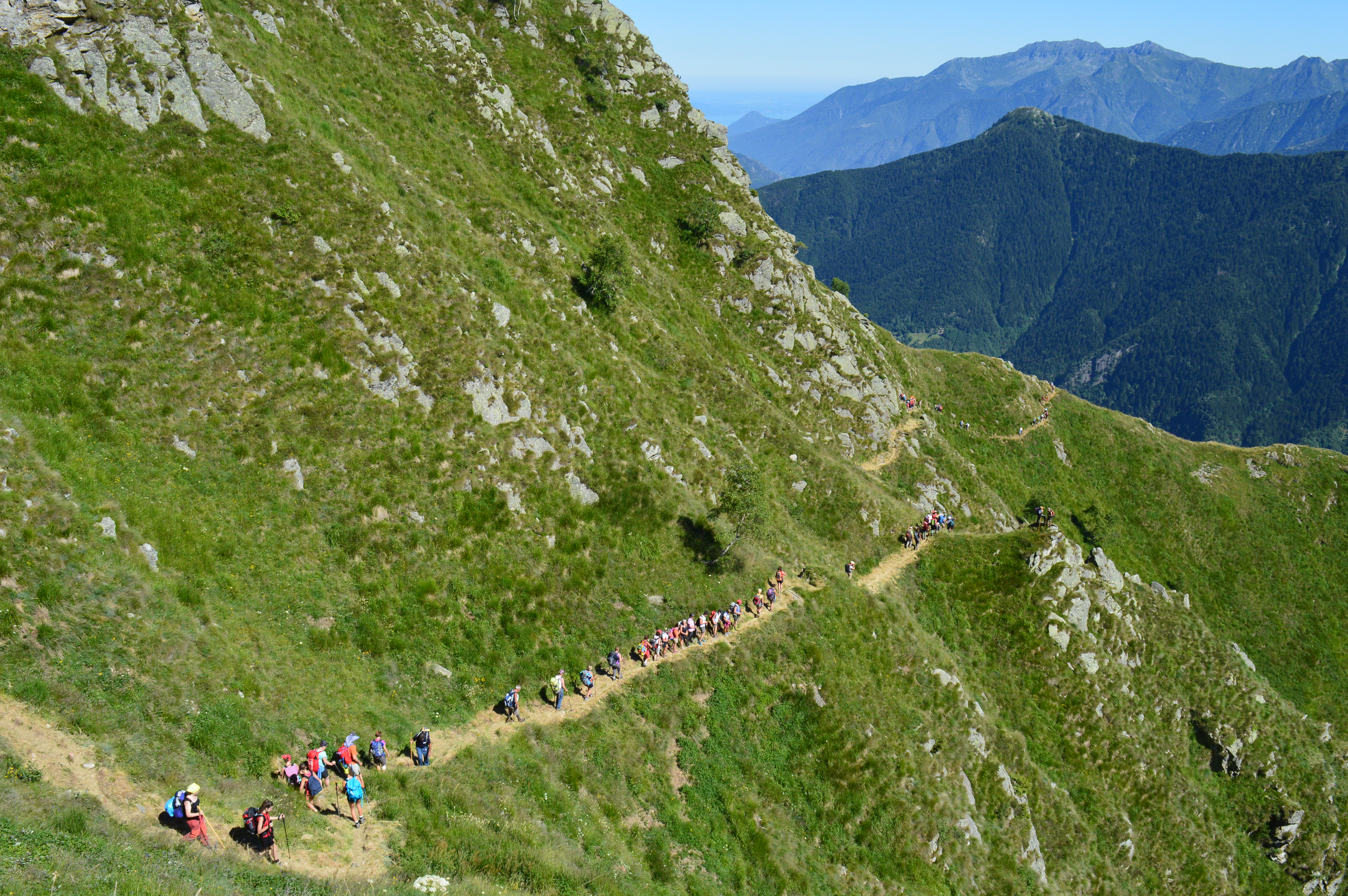 La lunga processione del Lautani scende dall'alpe Forcola verso Montescheno.